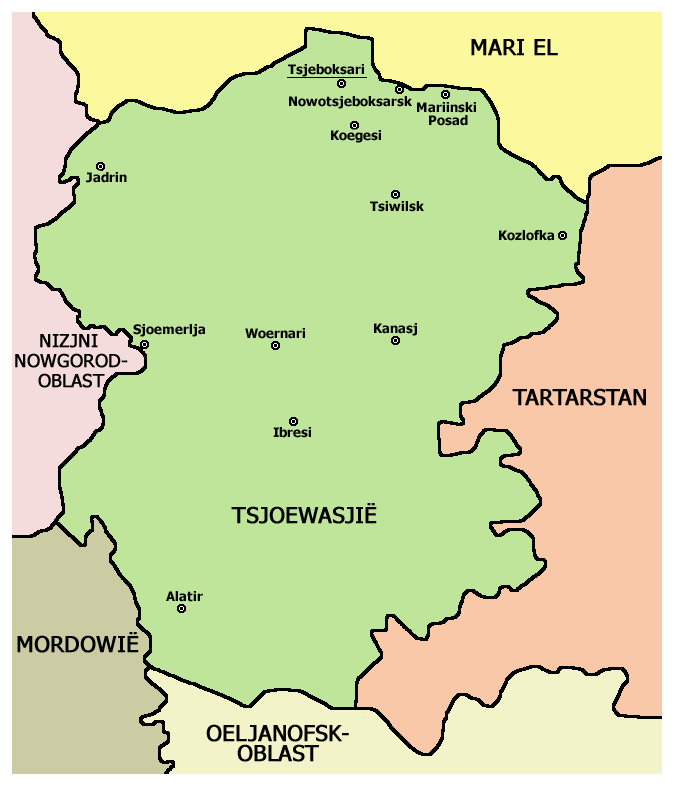 Kaart van Tsjoewasjië in Rusland